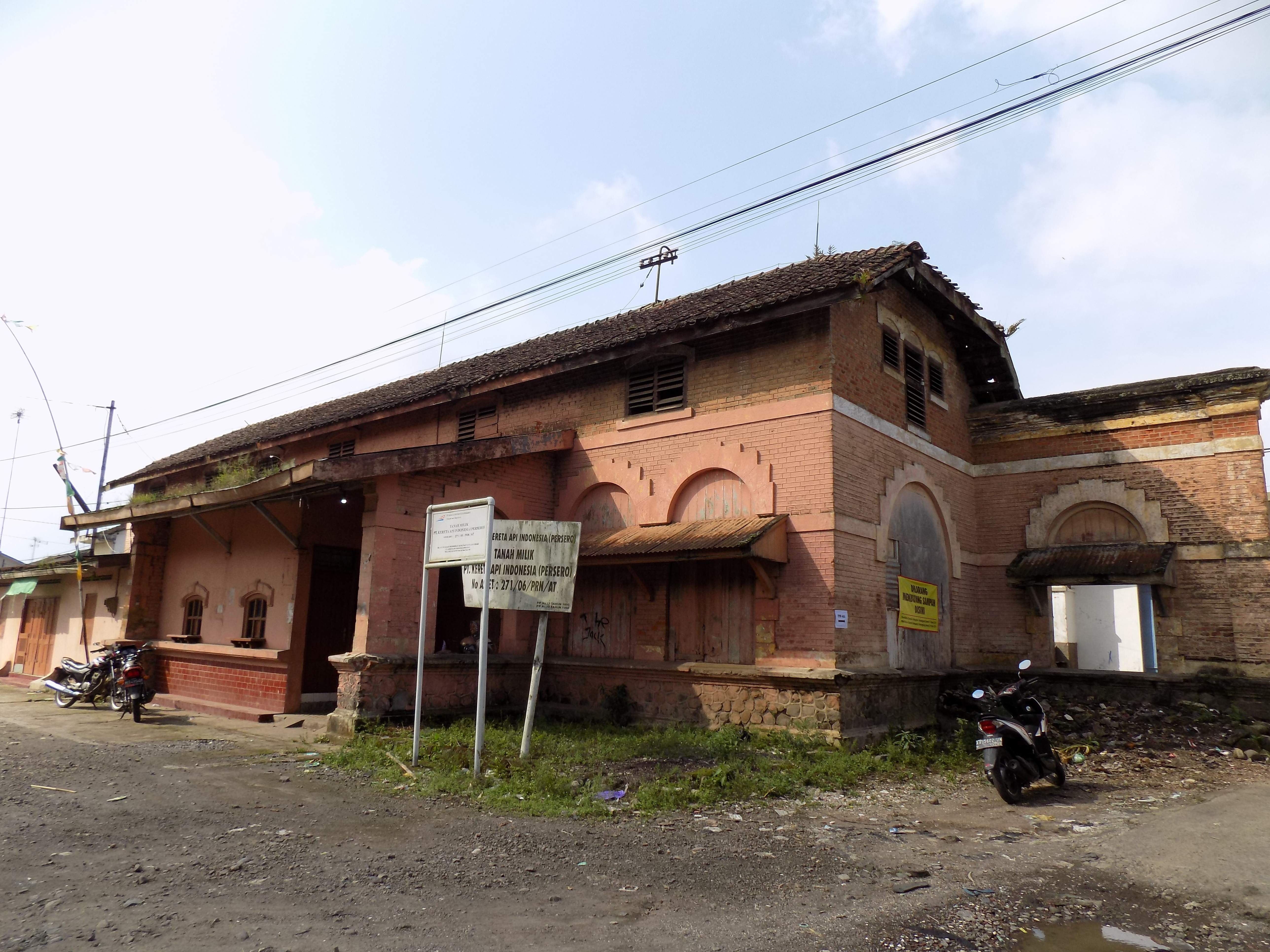 Stasiun Parakan